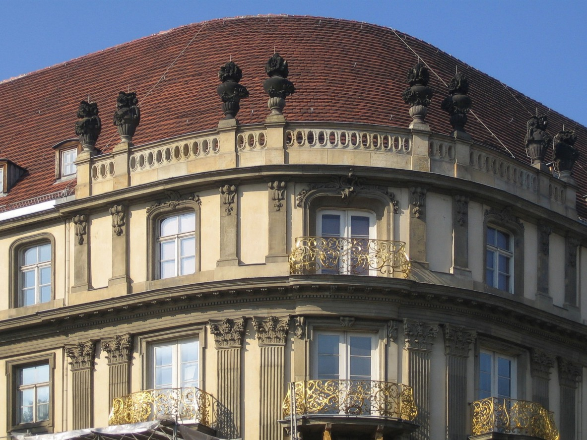 Berlin-Mitte. Das Ephraimpalais, Teilansicht.